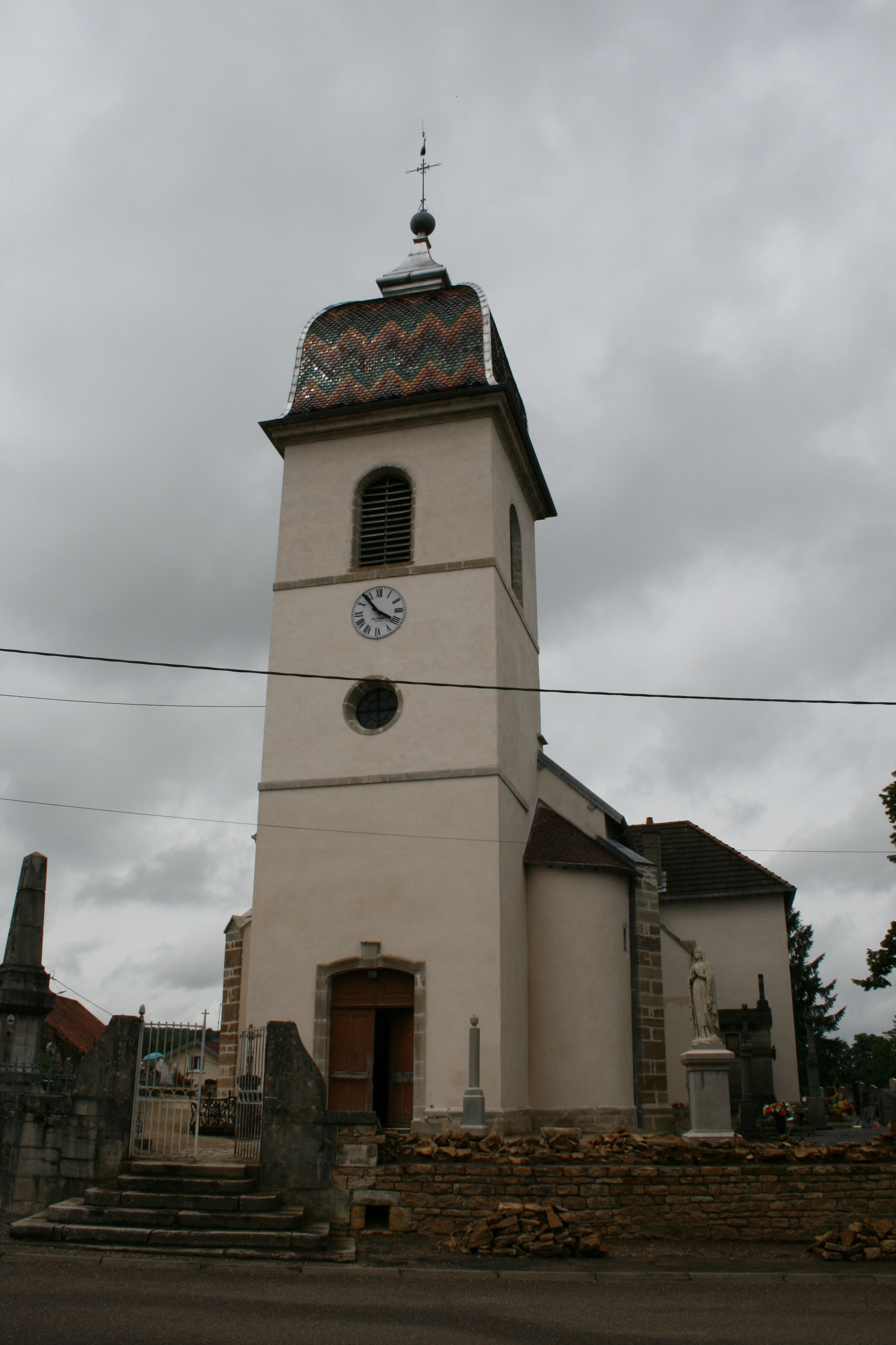 Cerre-lès-Noroy Eglise Saint Maurice XVIIIe siècle